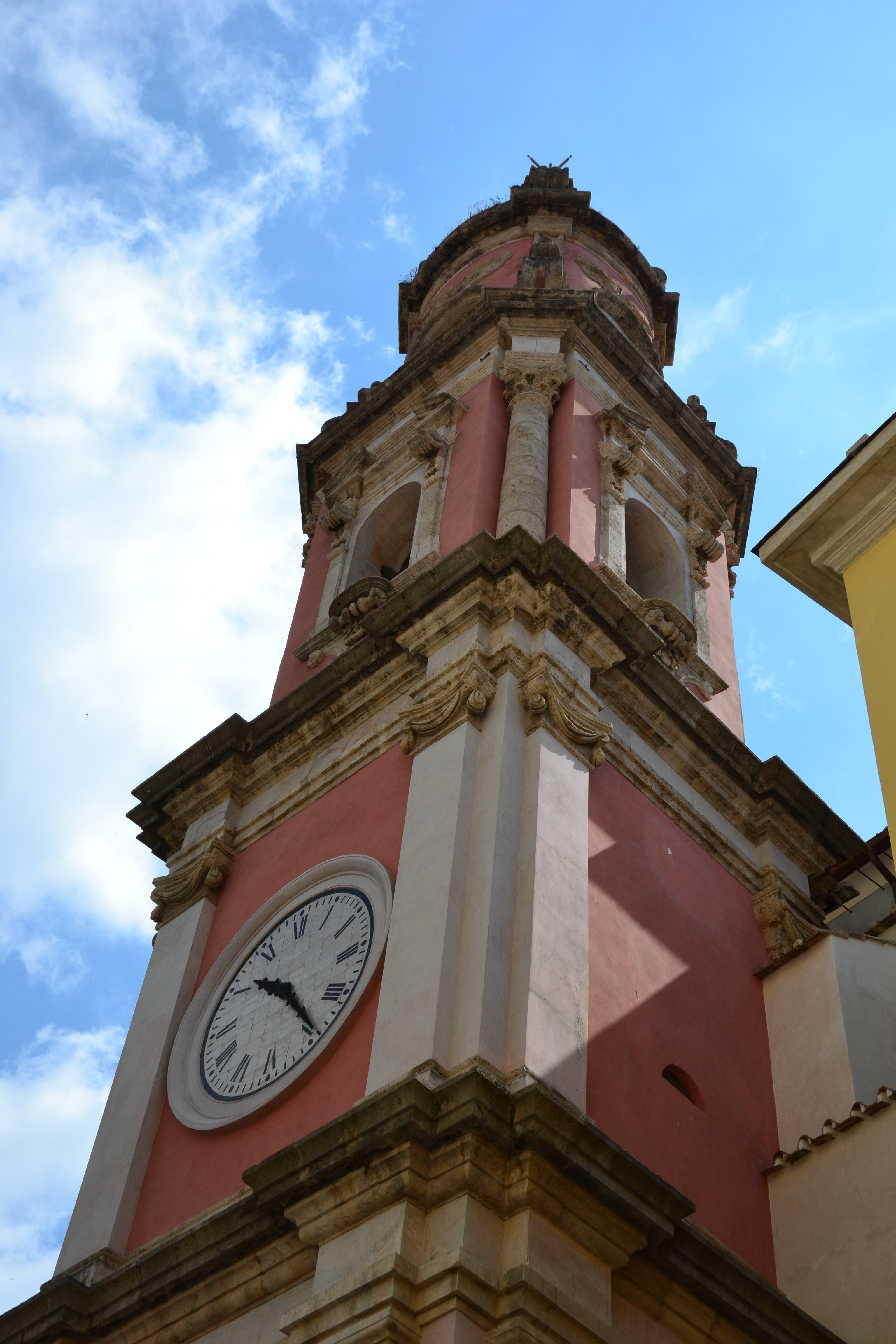 La chiesa della santissima annunziata a Salerno